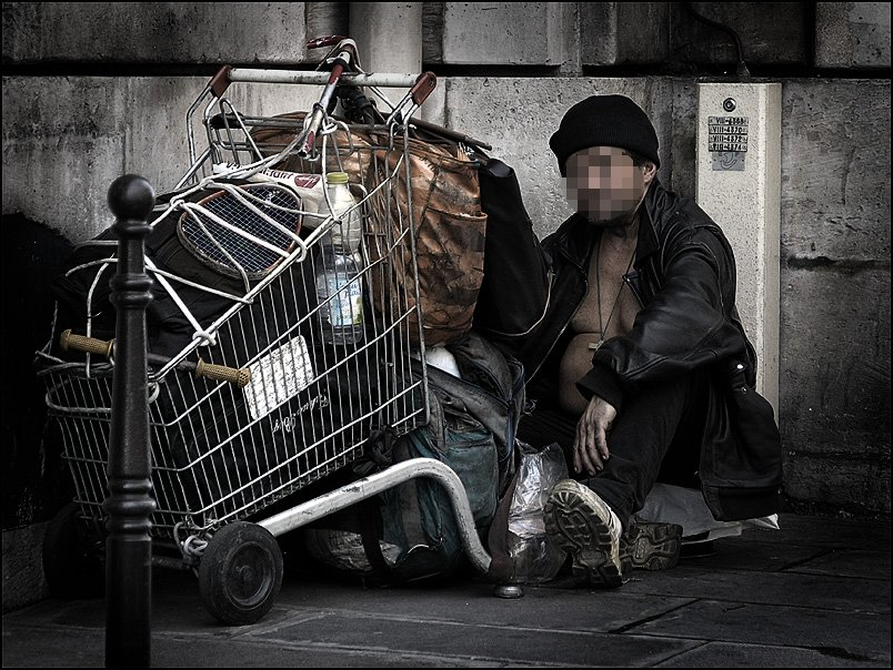 SDF (Sans domicile fixe) à Paris. See below for more translations.